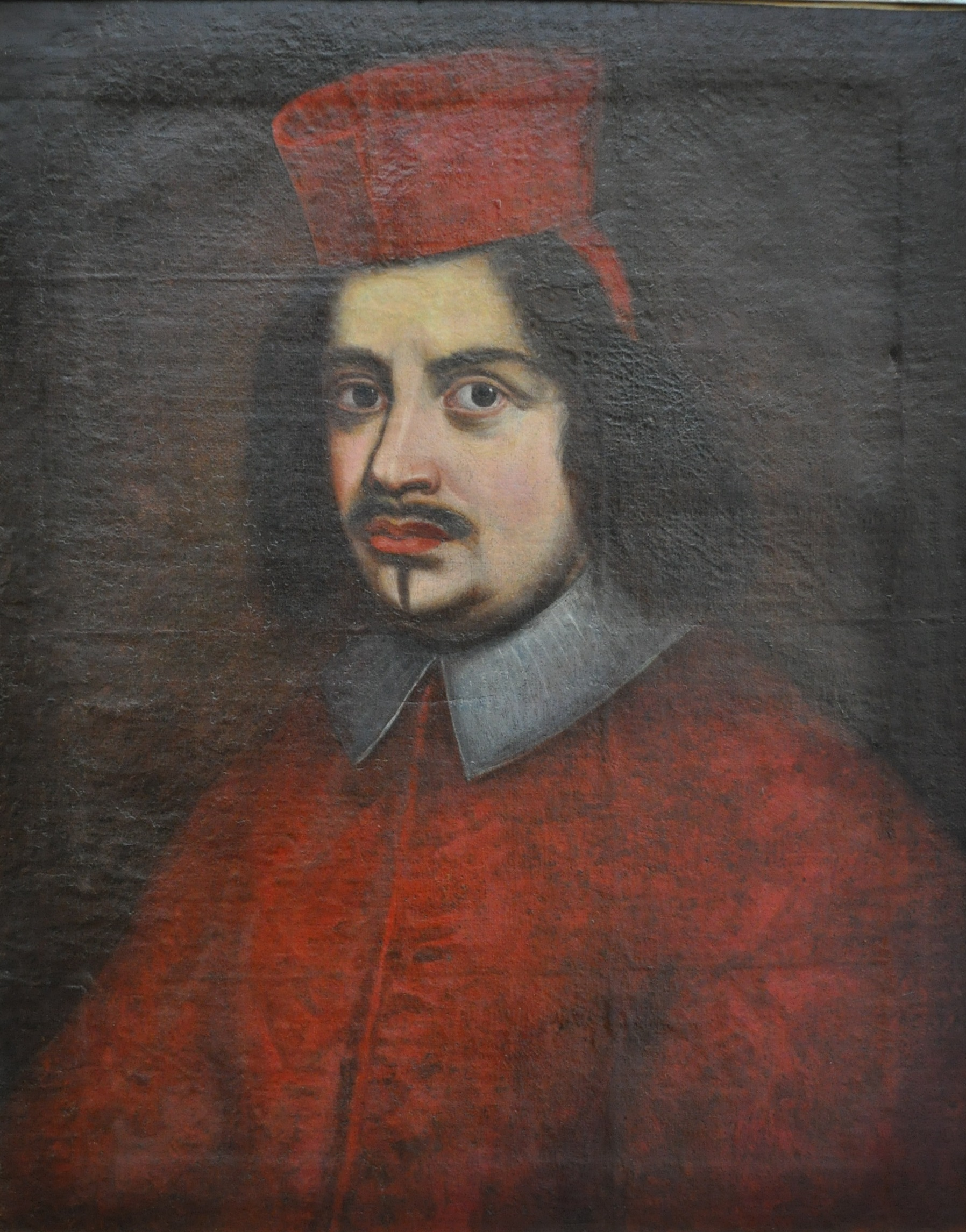 Kollonich Lipót horvát-osztrák származású magyar gróf, bíboros, esztergomi érsek, a magyarországi ellenreformáció vezéralakja.